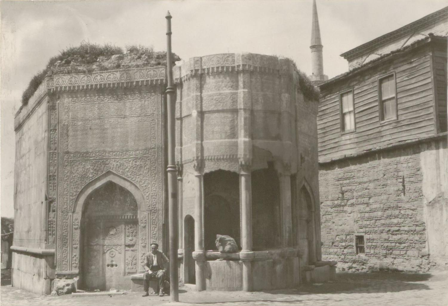 Saliha Sultan Fountain, a typical square fountain of 18th century Ottoman architecture, was built on the order of Valide Saliha Sultan, mother of Sultan Mahmud I, by the architect Mehmet Ağa. In the style of the Tulip Period of architecture, the foundation is adorned with marble floral motifs. This decorative layer was partially demounted in 1910 by Kemal Altan to be renovated, but it couldn’t be replaced for some years because of the First World War. The second restoration was perfomed by Ali Saim Ülgen between 1952 and 1953. With the construction of a new road in front of the fountain, its position within the square was lost. Having not been in use for many years, the fountain was restored in the 1990s by Pious Foundations and is now functioning once again. SALT Research, Söylemezoğlu Archive Saliha Sultan Çeşmesi, 18. yüzyılda kamusal mekânı tanımlamak ve zenginleştirmek üzere inşa edilmiş meydan çeşmelerindendir. Tümüyle mermer kaplı olan çeşme, tipik bir Lale Devri yapısı özelliği olan bitki motifleriyle dikkati çeker. 1732-1733’te, I. Mahmud’un annesi Valide Saliha Sultan tarafından, mimarbaşı Kayserili Mehmet Ağa’ya yaptırıldı. 1910’da Kemal Altan tarafından restore edilmek üzere kısmen söküldü ama araya Birinci Dünya Savaşı’nın girmesiyle restorasyon uzunca bir süre tamamlanamadı. İkinci restorasyon çalışması, 1952-1953’te Ali Saim Ülgen tarafından yapıldı. Daha sonra önünden geçirilen yolla meydan çeşmesi olma özelliğini yitirdi. Uzun yıllar atıl vaziyette durduktan sonra, 1990’larda Vakıflar Genel Müdürlüğü tarafından onarılarak yeniden çeşme olarak işlev görmeye başladı. SALT Araştırma, Söylemezoğlu Arşivi